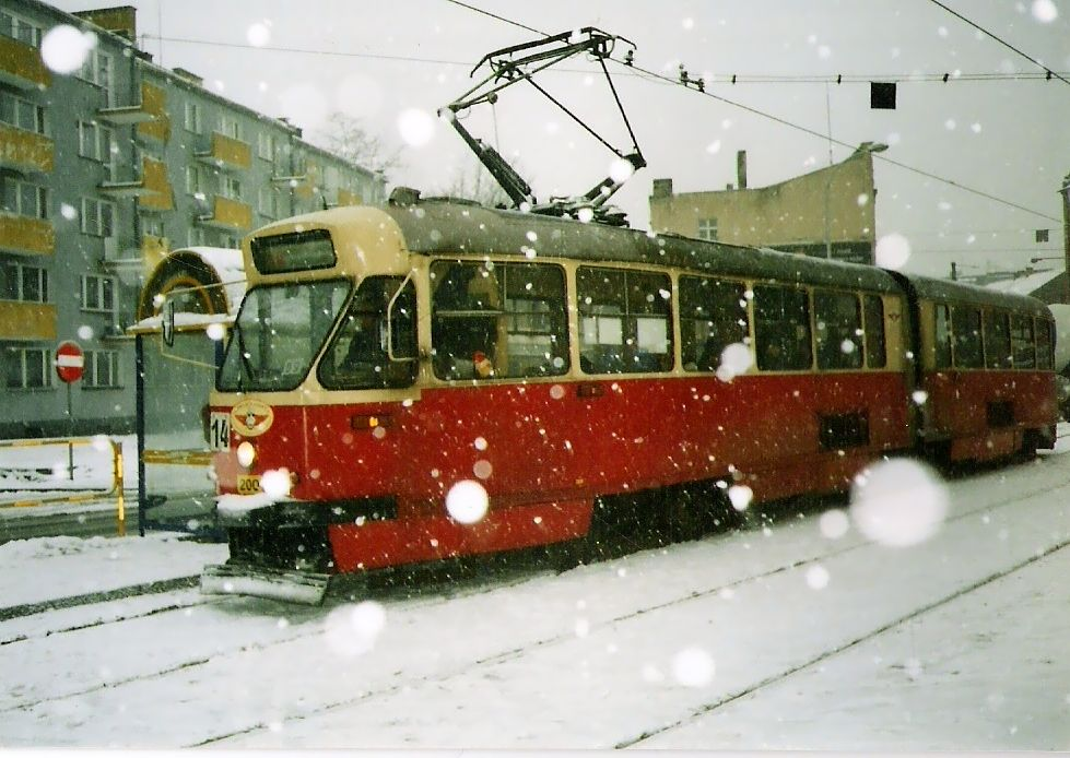 Mysłowice Szpital - linia 14.